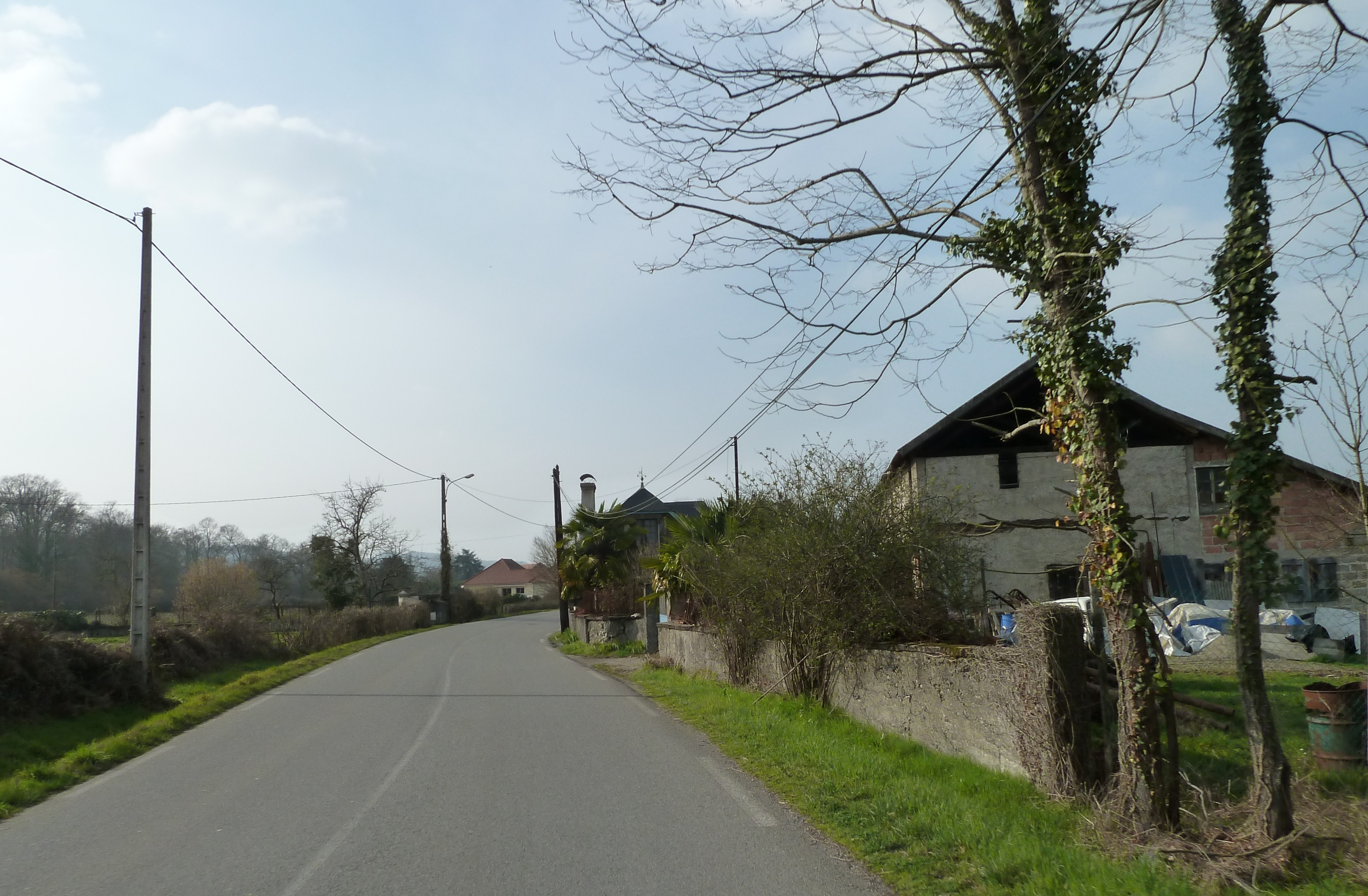 Artiguelouve